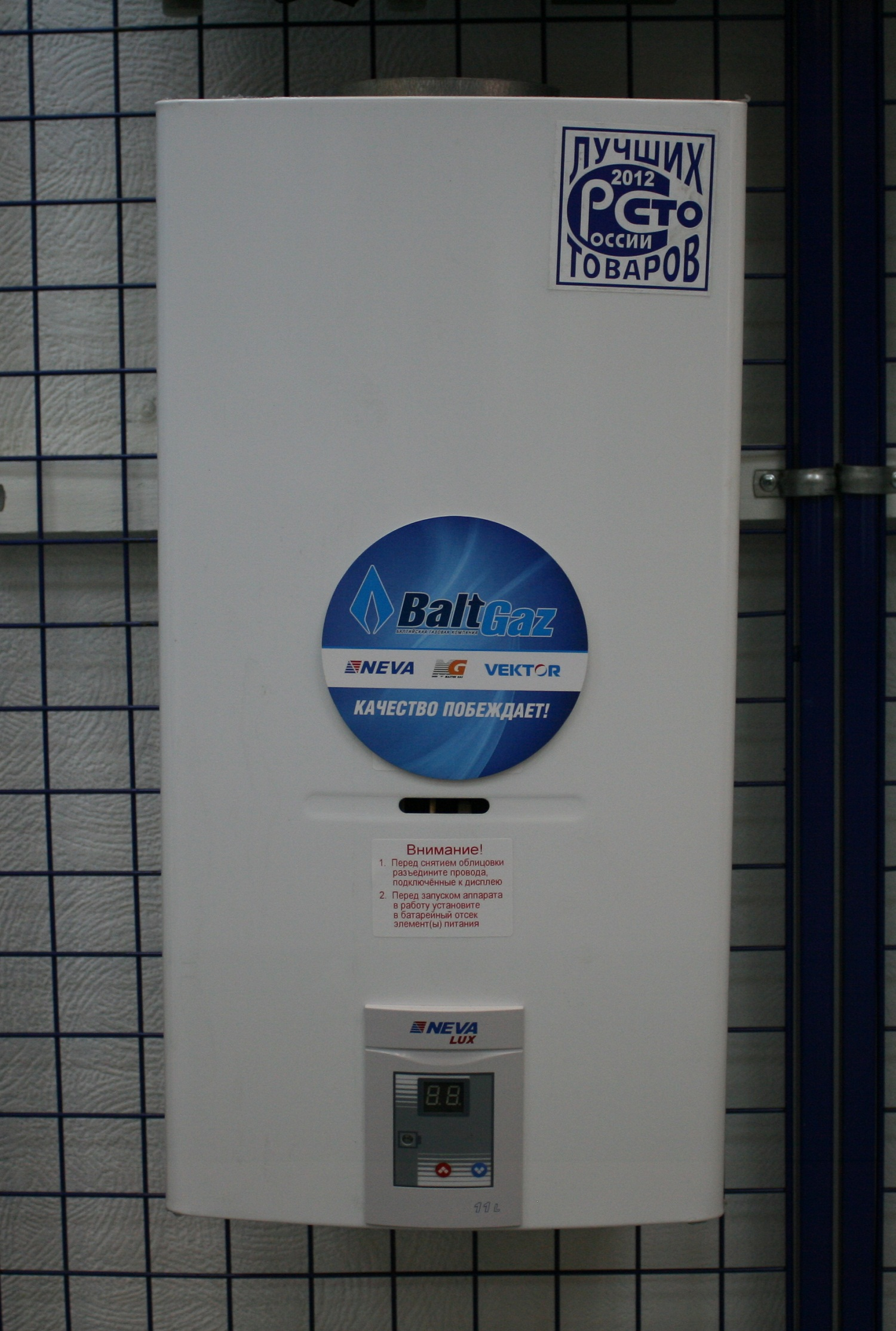 Водонагреватель газовый проточный NEVALUX-6011